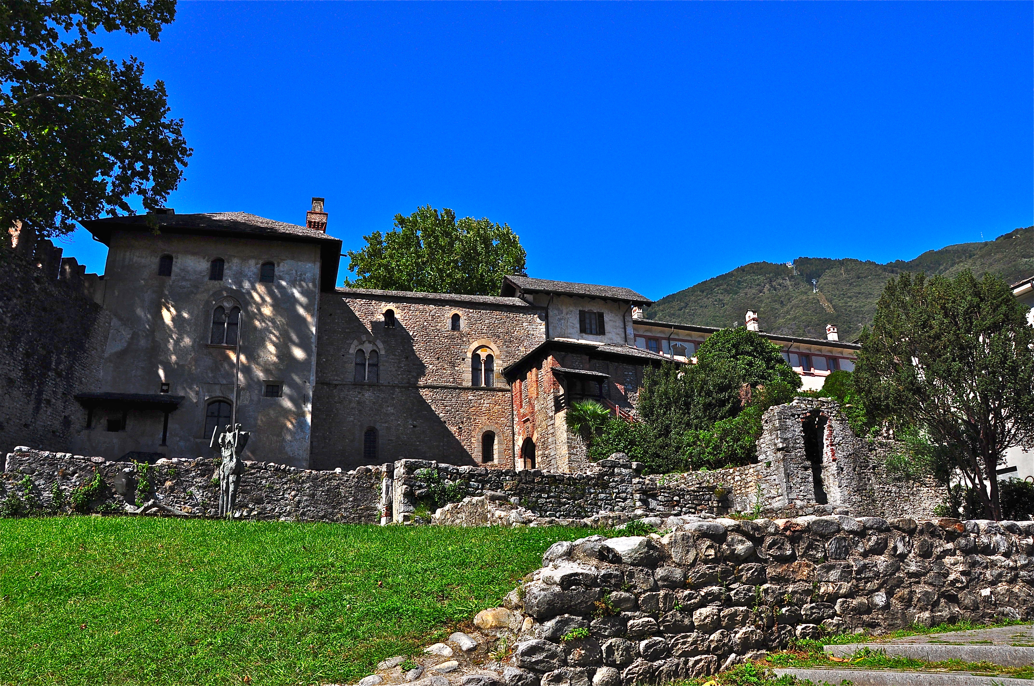 Facciata sudorientale. Nello sfondo a destra si scorge Casorella.